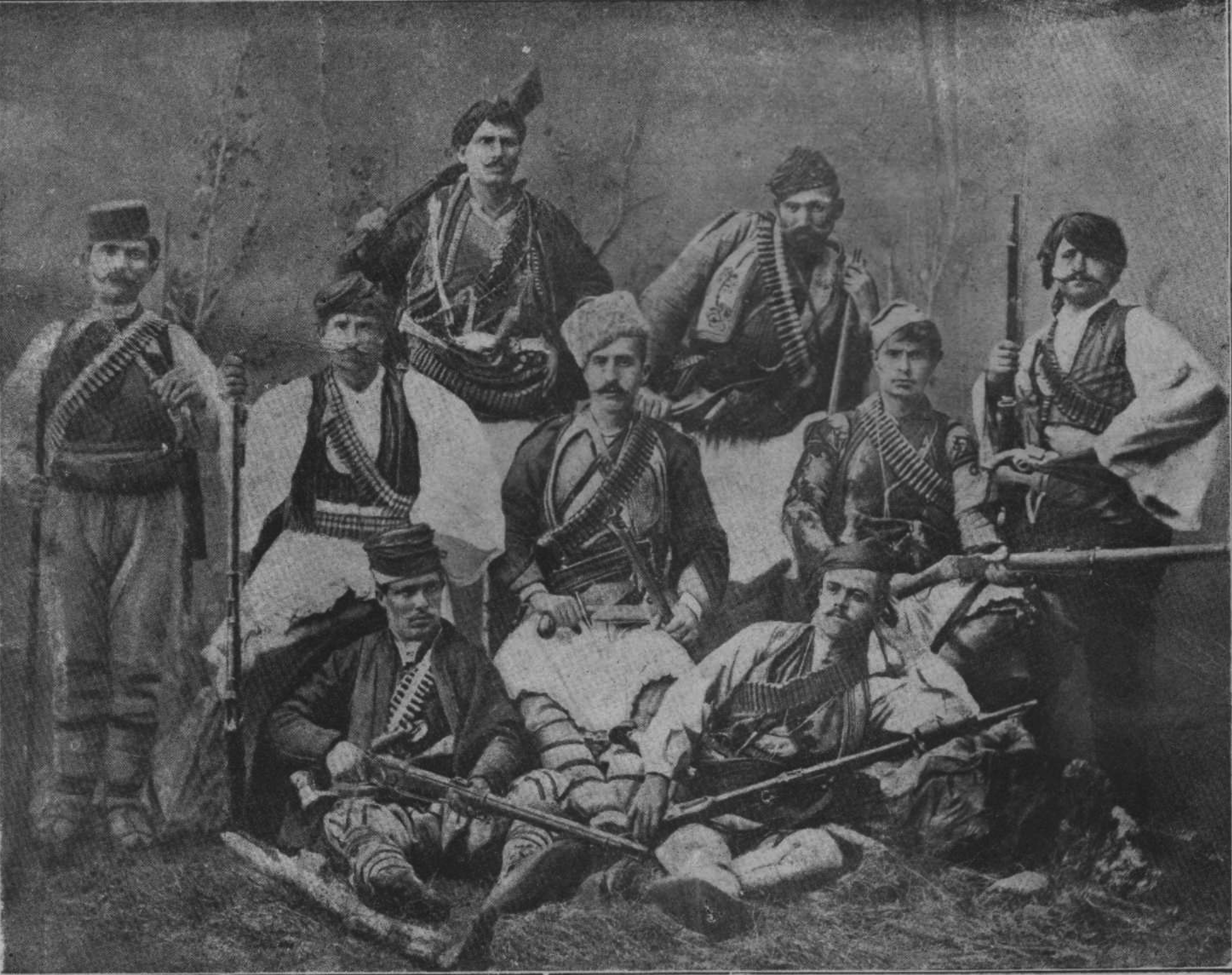 Прилепската чета на Коне Павлов.